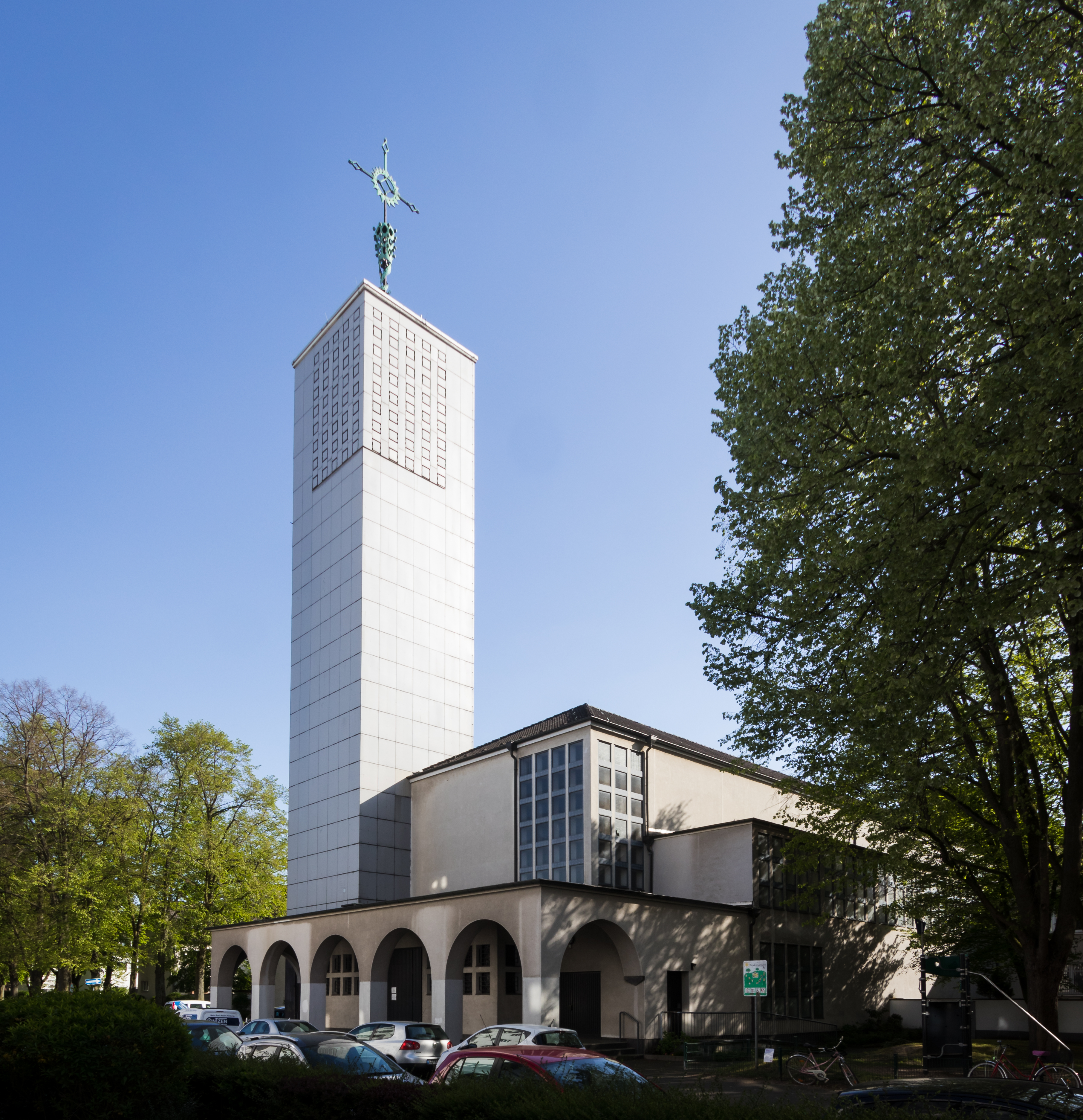 St. Petrus Canisius, Köln Buchforst. Architekt Wilhelm Riphahn